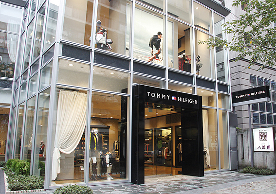 トミー ヒルフィガー 自由が丘店外観